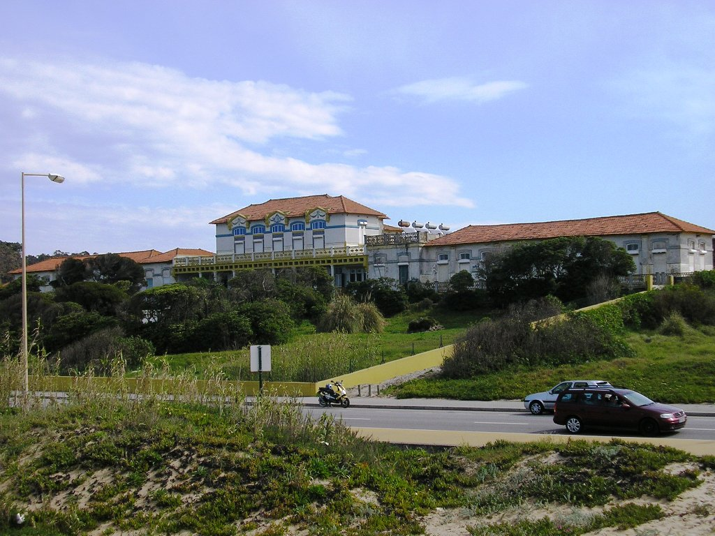 "Sanatório Marítimo", in Francelos, Vila Nova de Gaia, Portugal